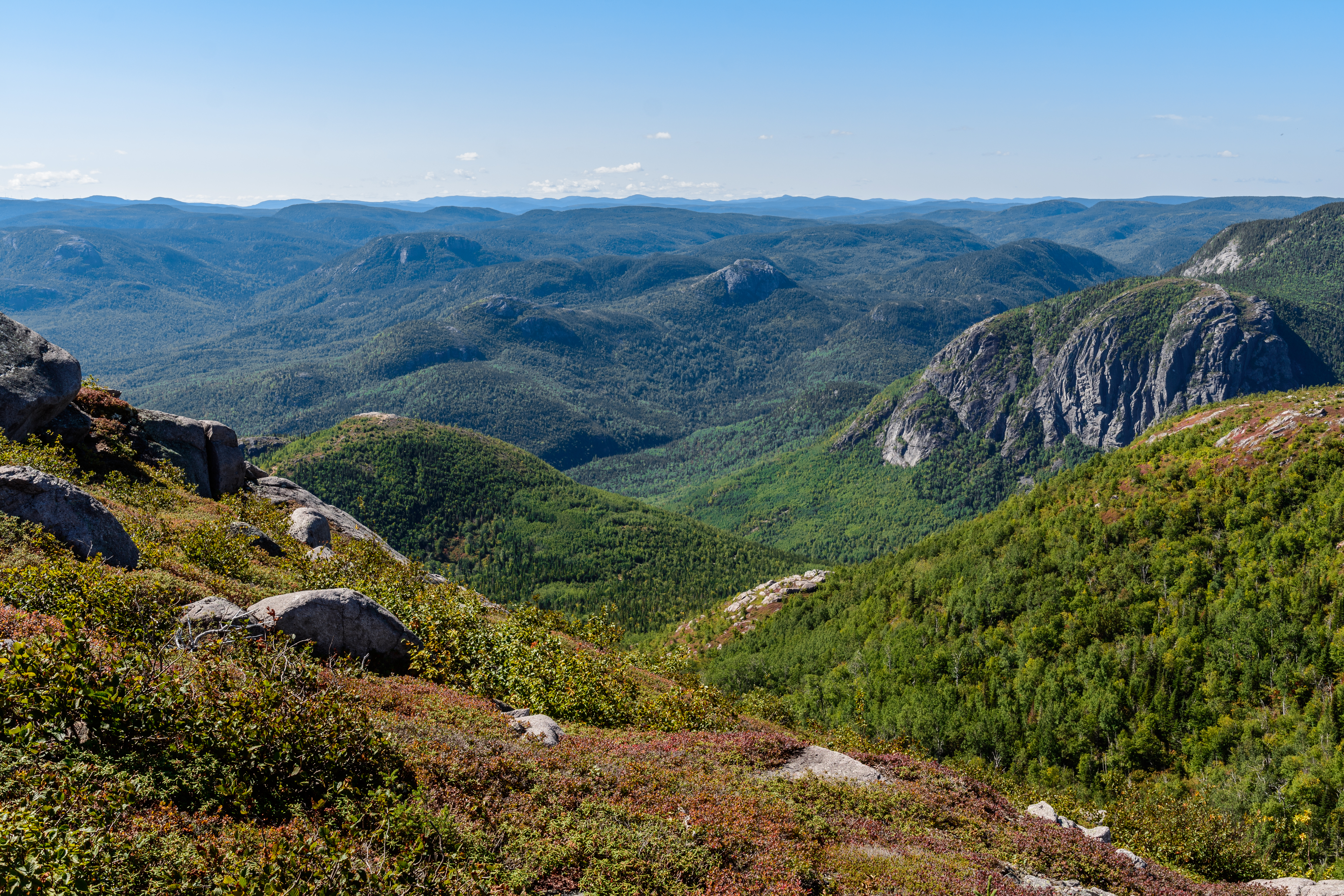 Parc national des Grands-Jardins, Canada